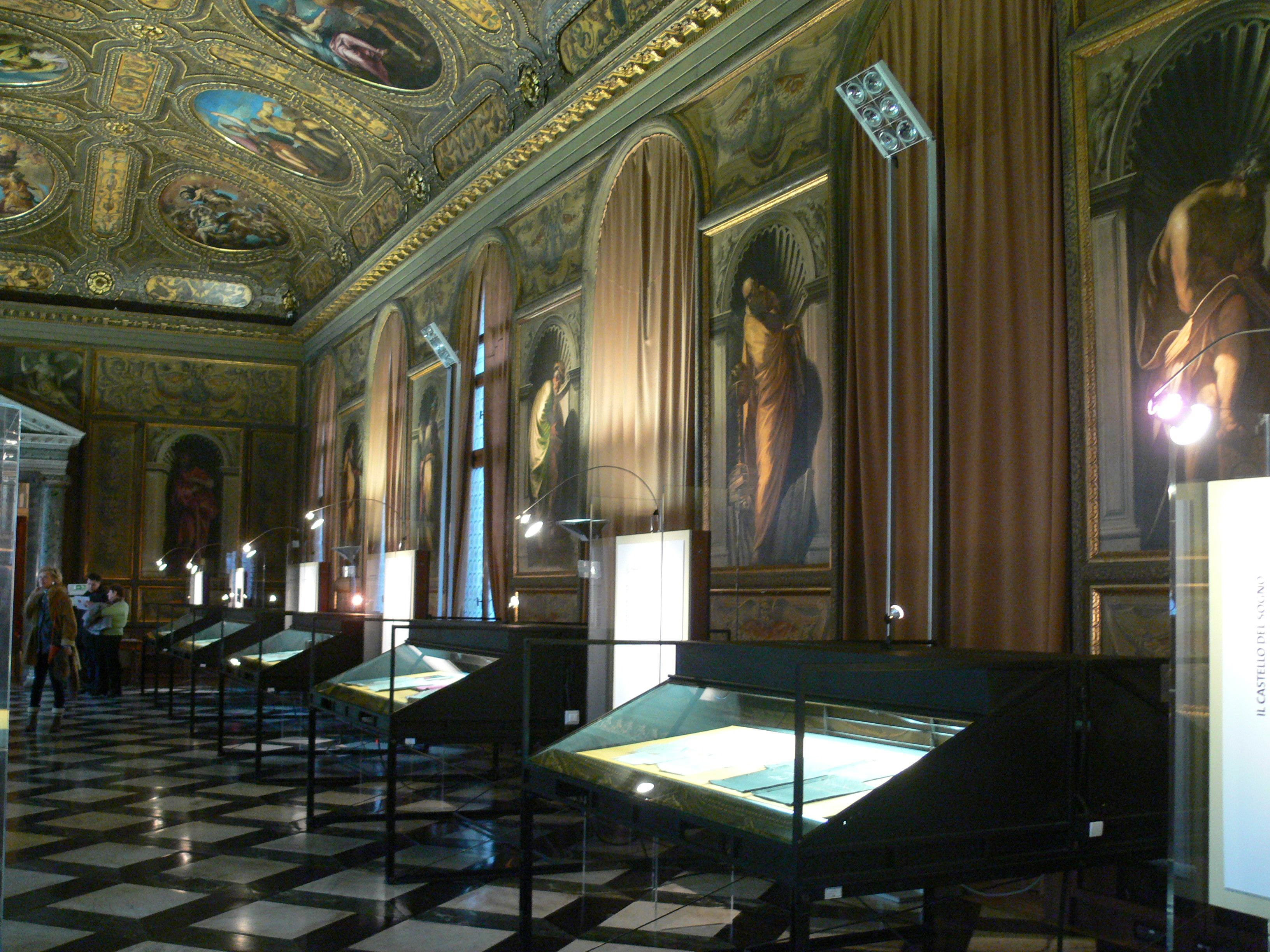 Biblioteca Marciana à Venise. Salle monumentale : fresques sur les murs